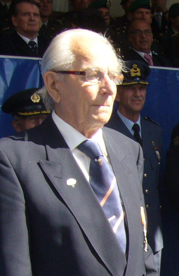 Piet van den Hoek, Ridder Militaire Willems-Orde